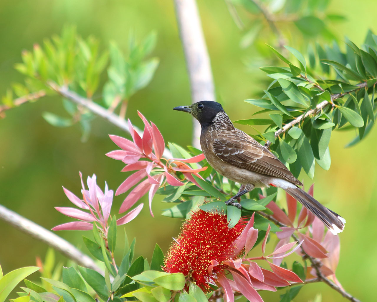 Bulbul à ventre rouge, Tadoba (Inde)